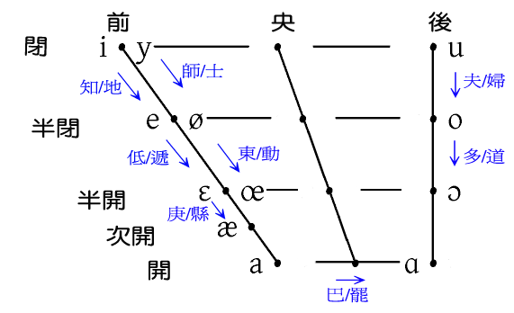 福清話寬窄韻變化圖